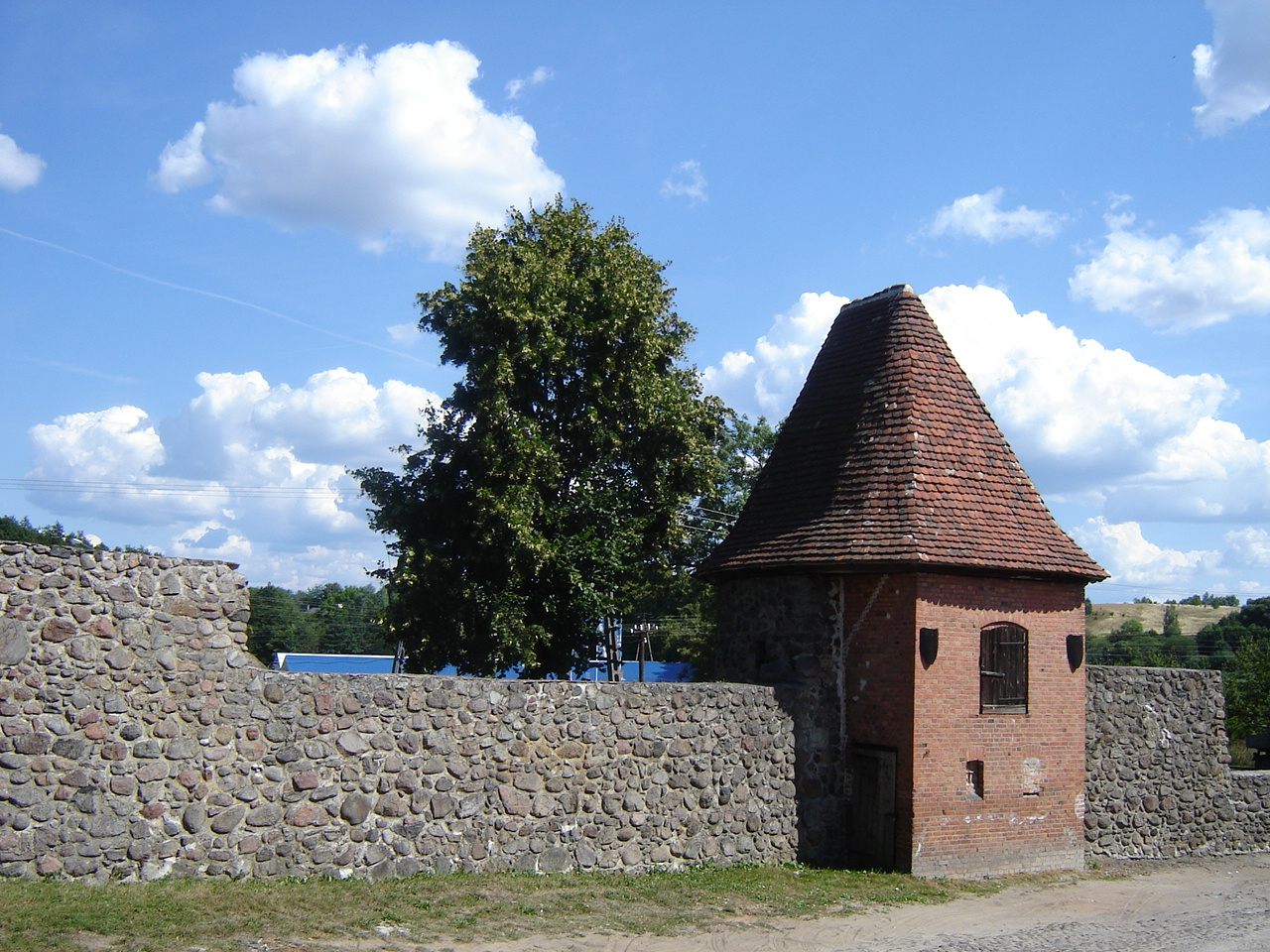 "Czatownia" wraz z murem obronnym, autorka: H.Ciszewska-Czyż